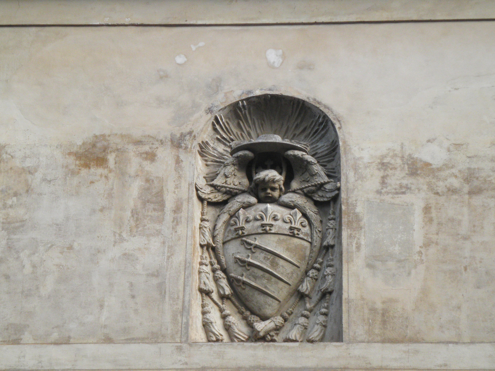 Roma, piazza Capo di Ferro. Stemma del cardinale Spada su palazzo Ossoli Soderini